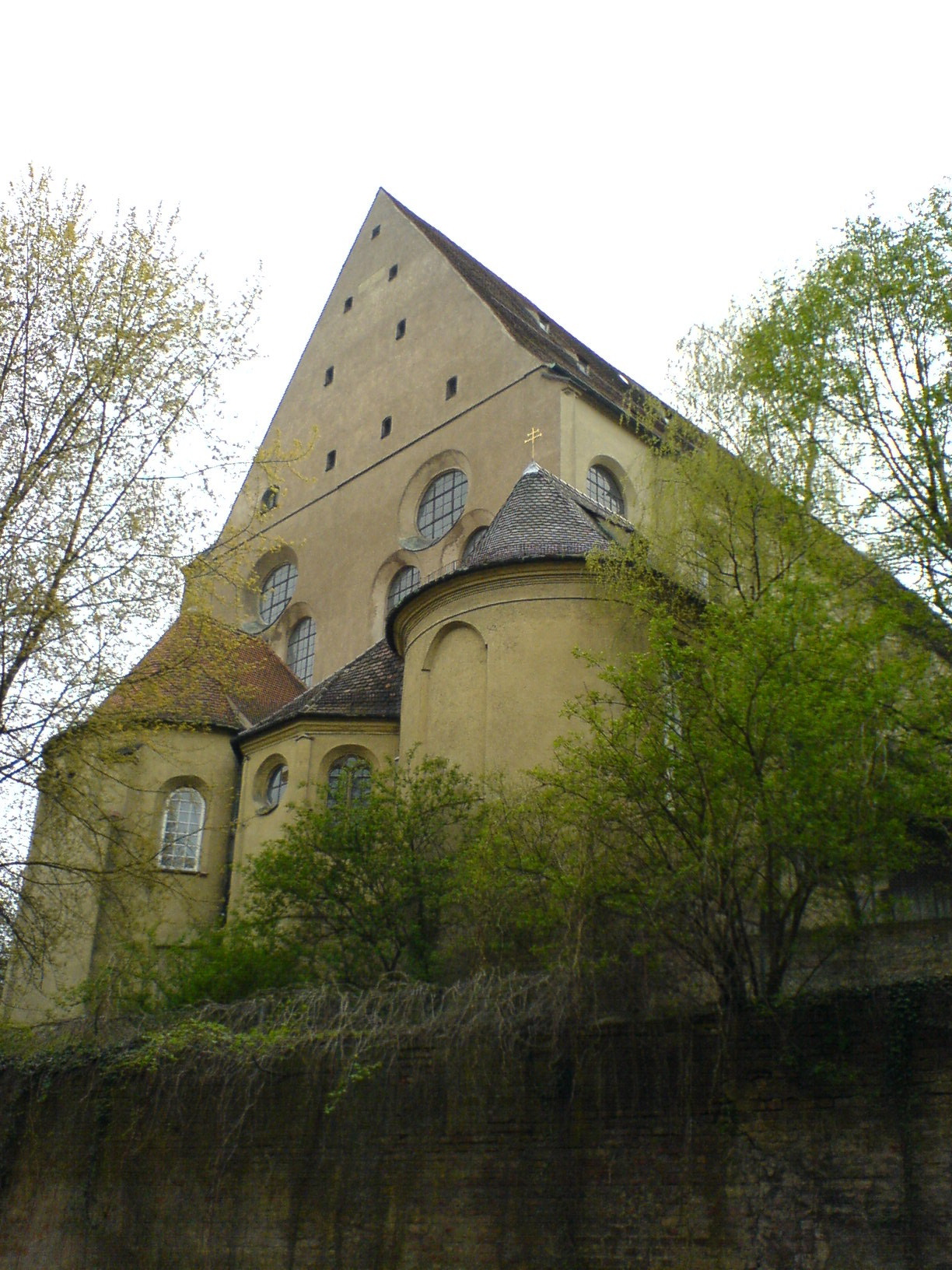 Die Rückseite des Römischen Museums in Augsburg. This is a photograph of an architectural monument.